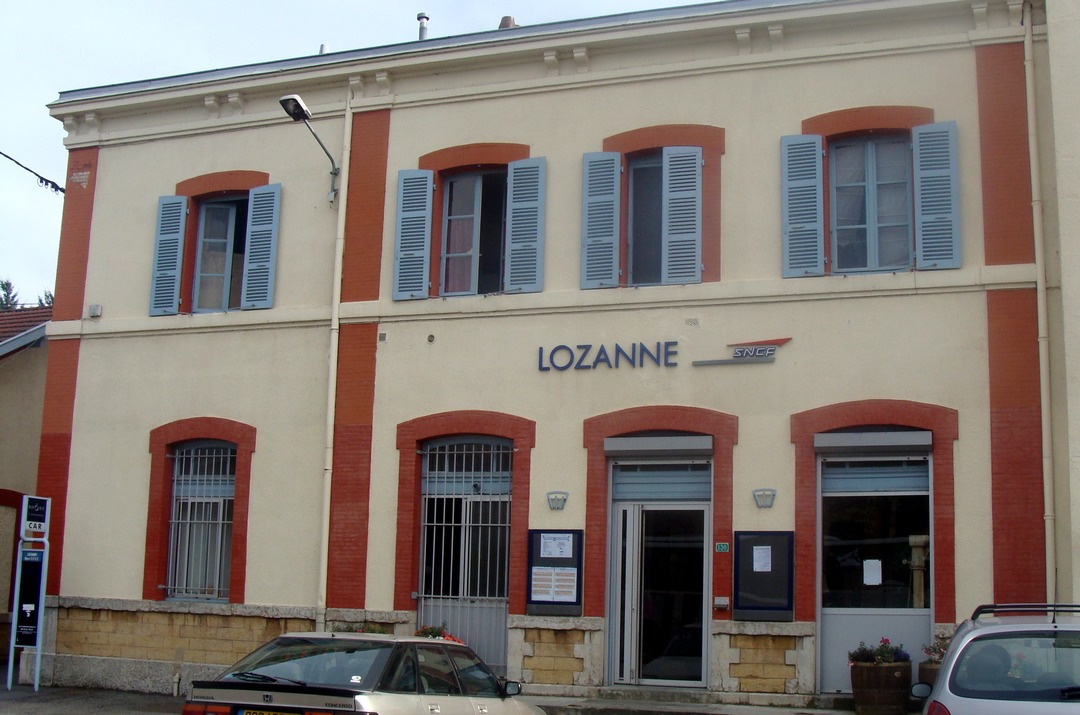 La façade de la gare de Lozanne (Rhône)